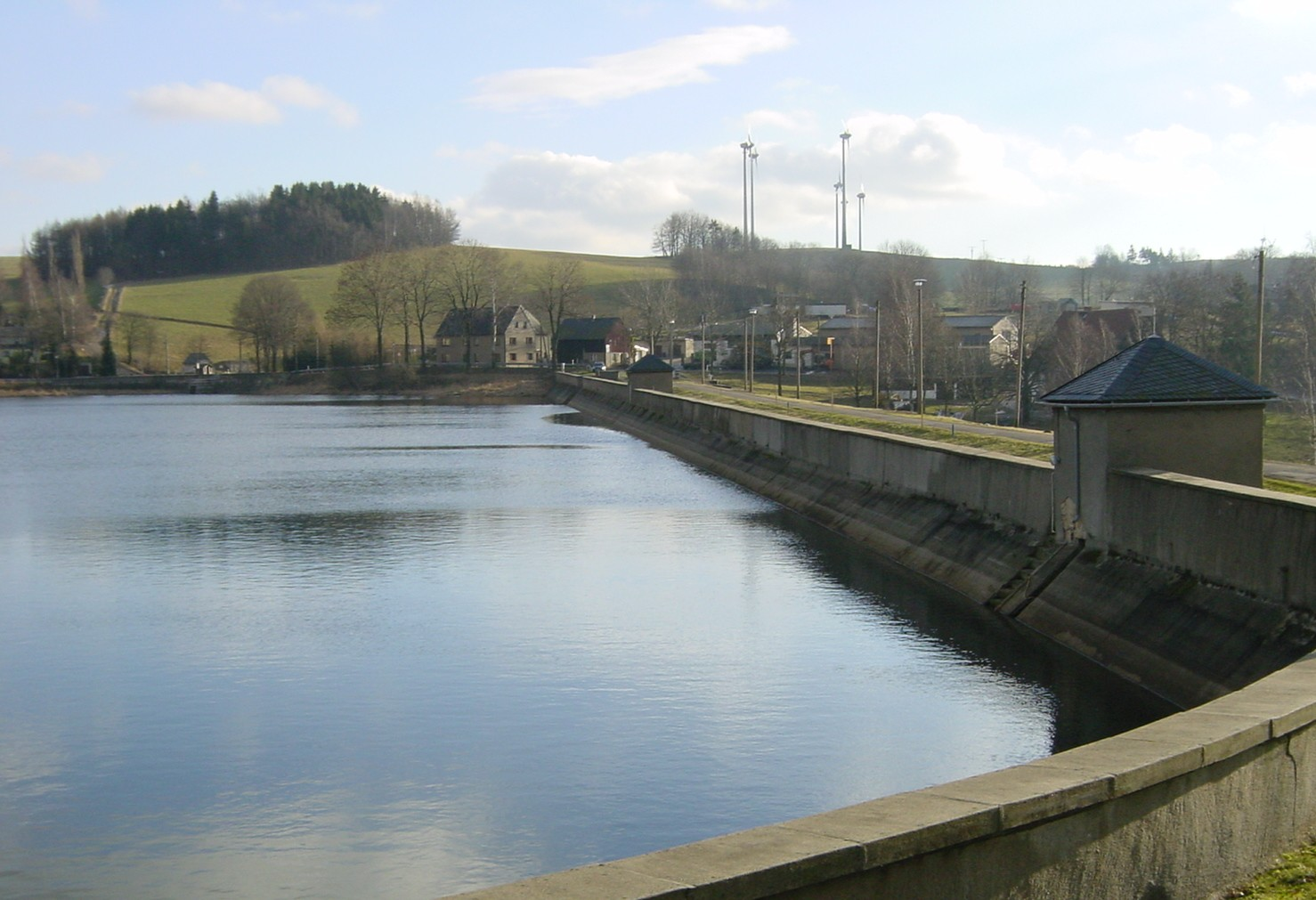 Der Dittmannsdorfer Teich der Revierwasserlaufanstalt; selbst fotografiert; gemeinfrei